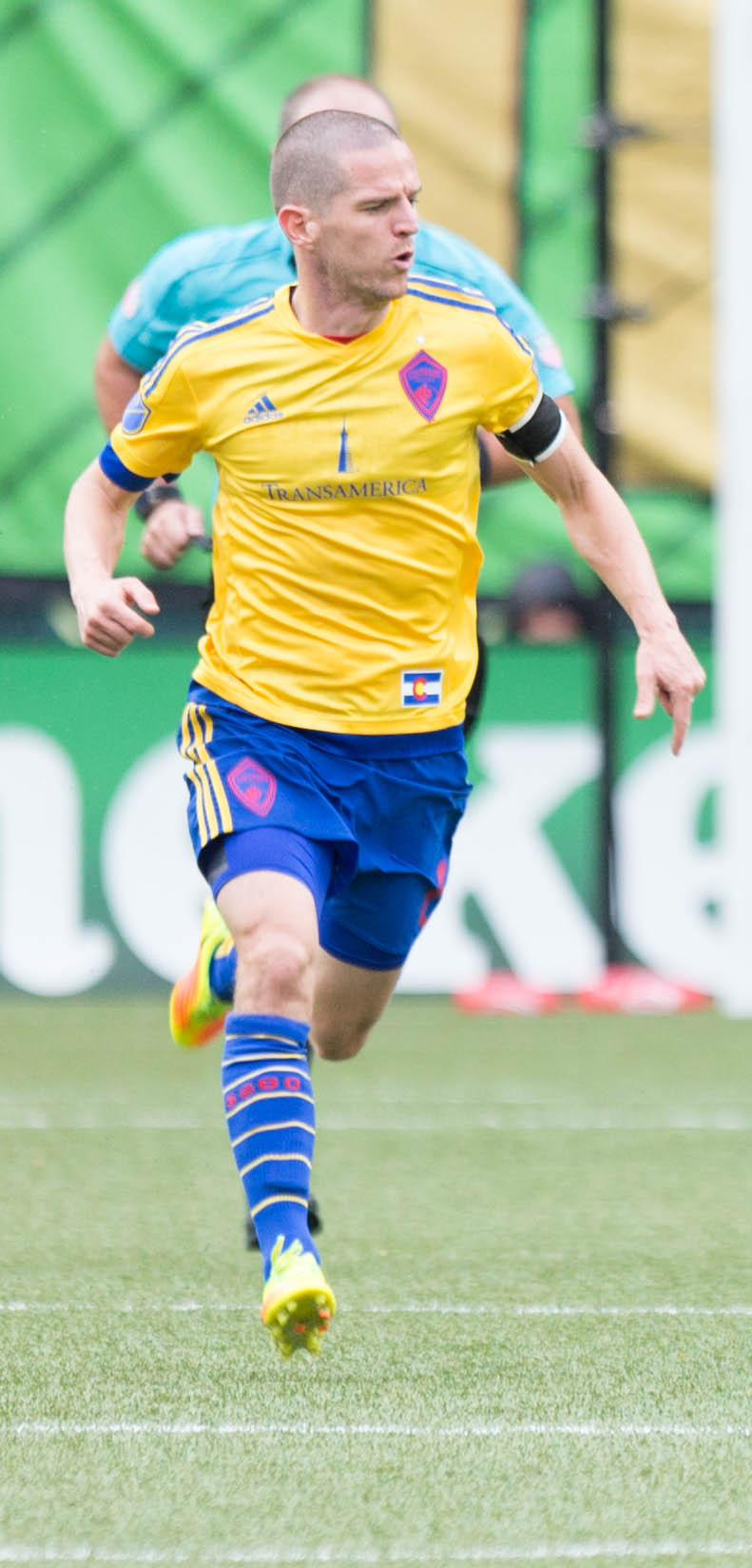 N42A0680.jpg